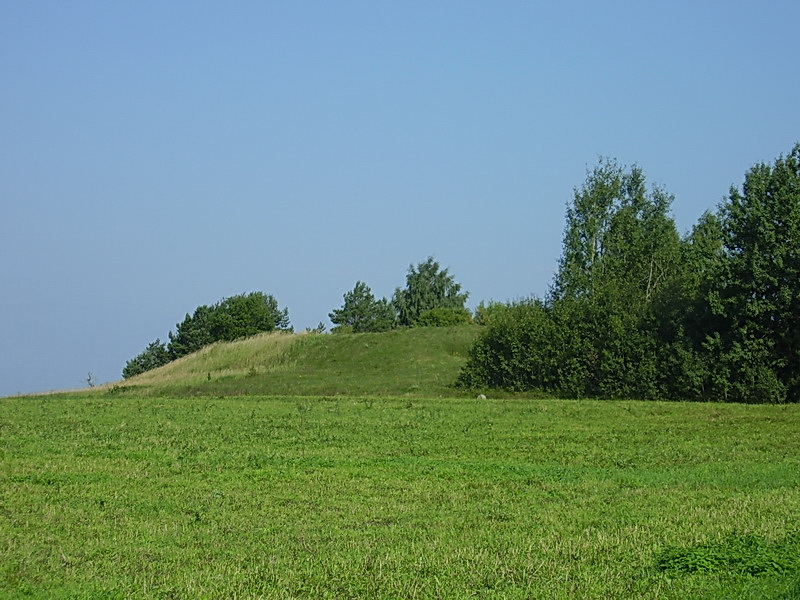 Гарадзішча (Мядзельскі раён). Гарадзішча